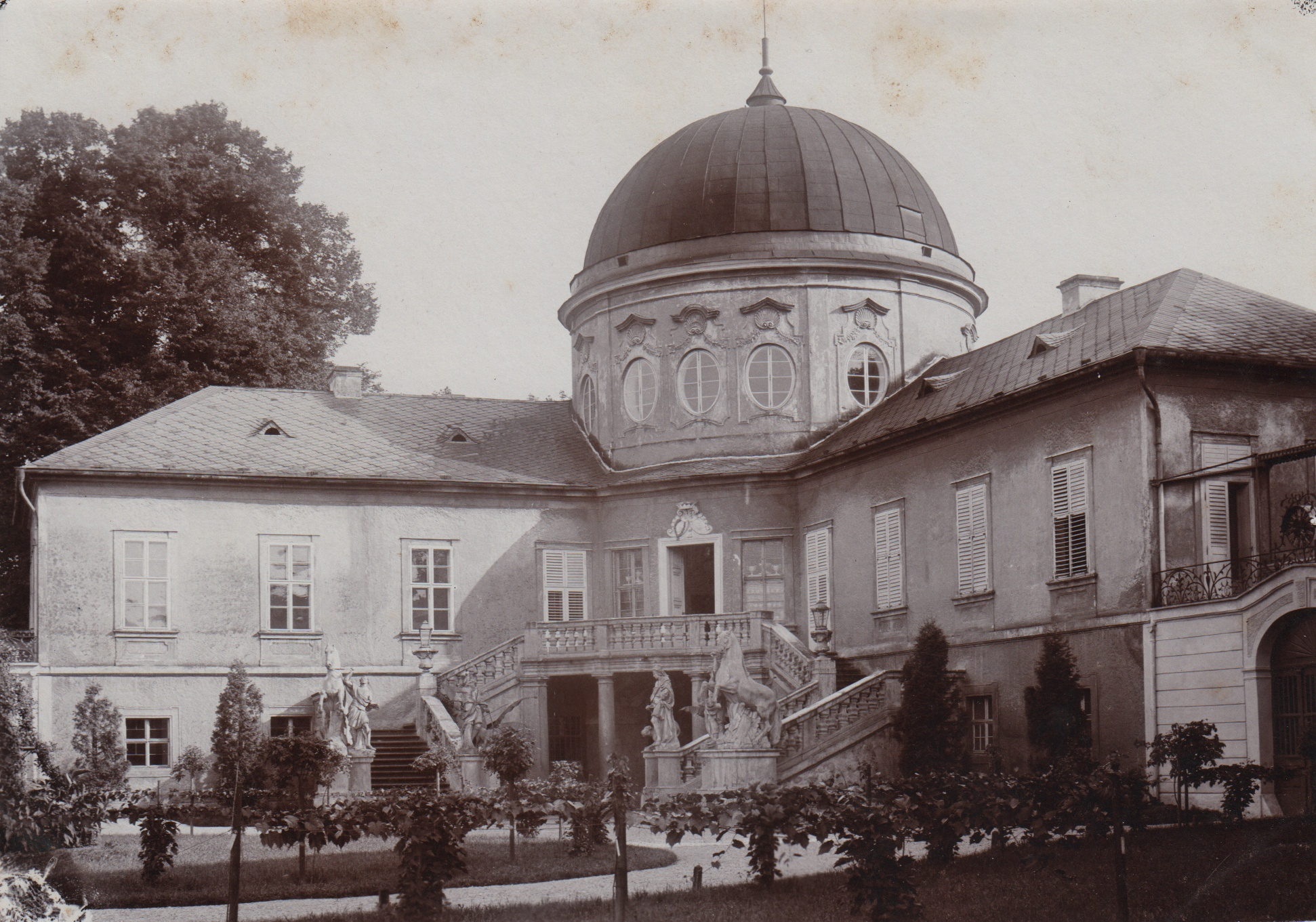 Zámek Veltrusy, pohled z čestného dvora.